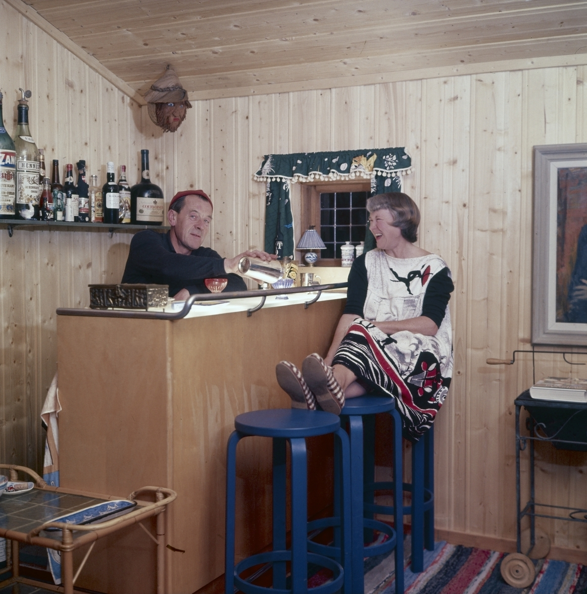 Fra Greta Molander og Kaare "Petrus" Barths landsted på Veierland.